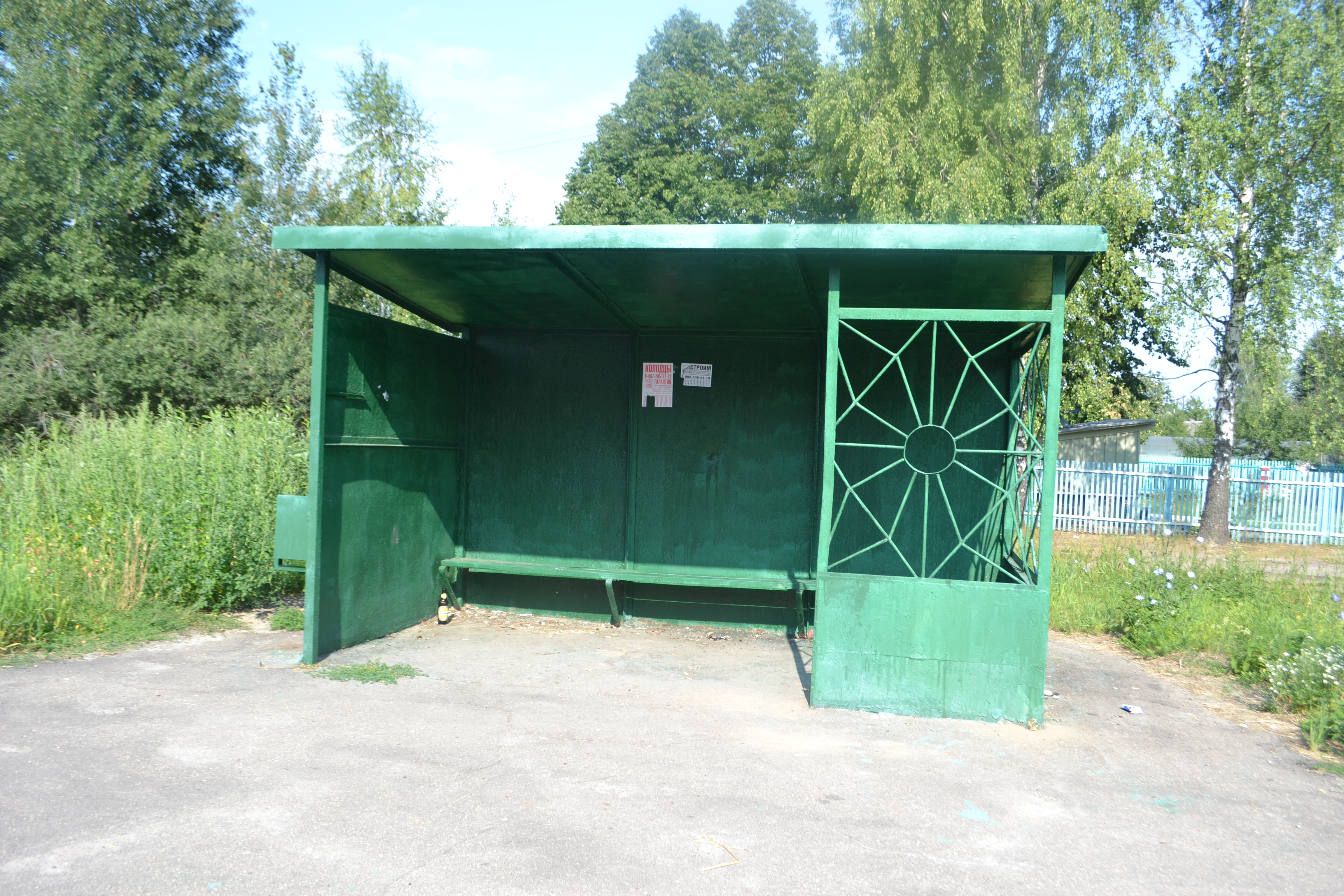 Остановка Голыгино (Шатурский район)